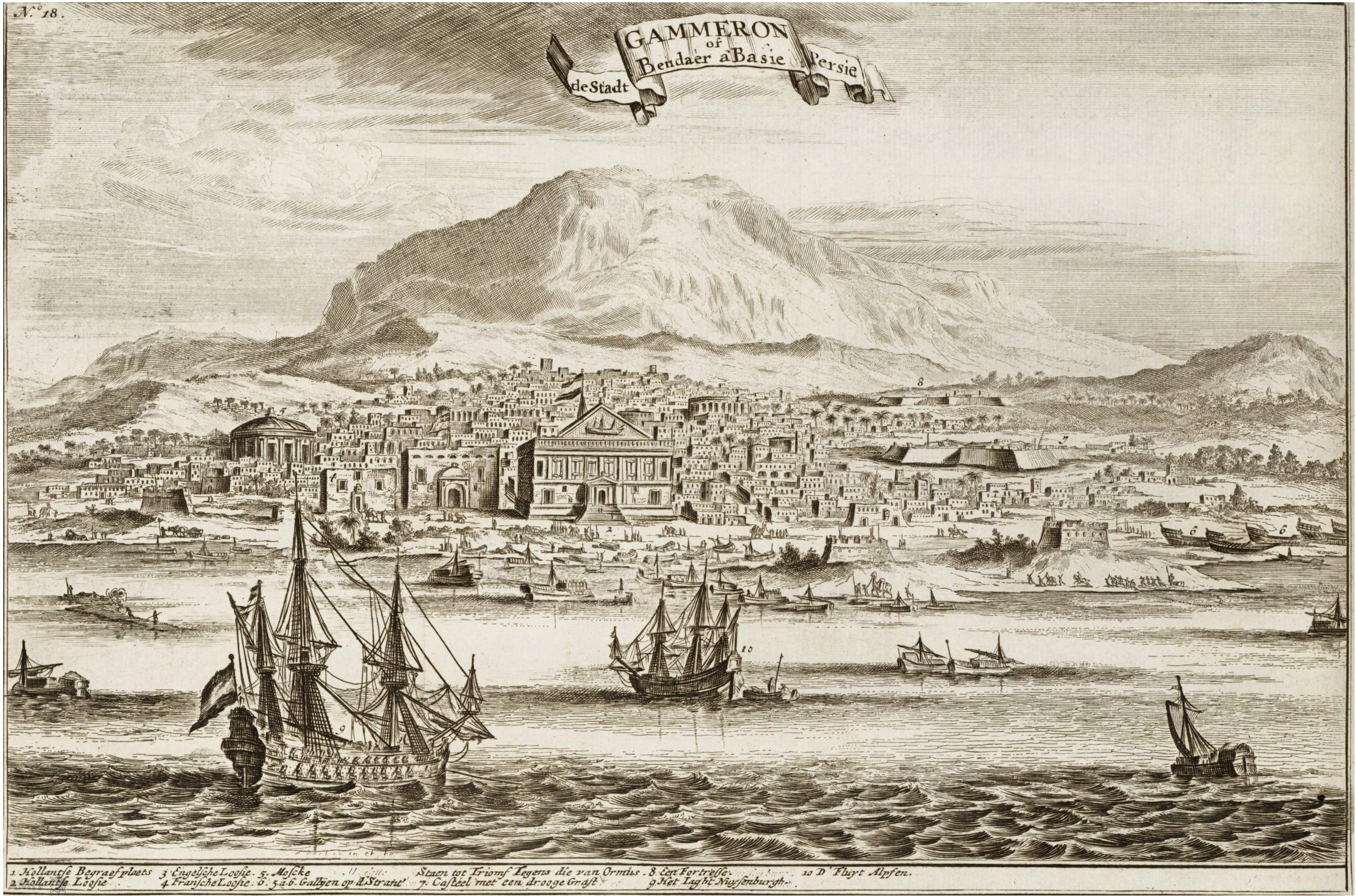 بندرعباس قرن هفدهم میلادی